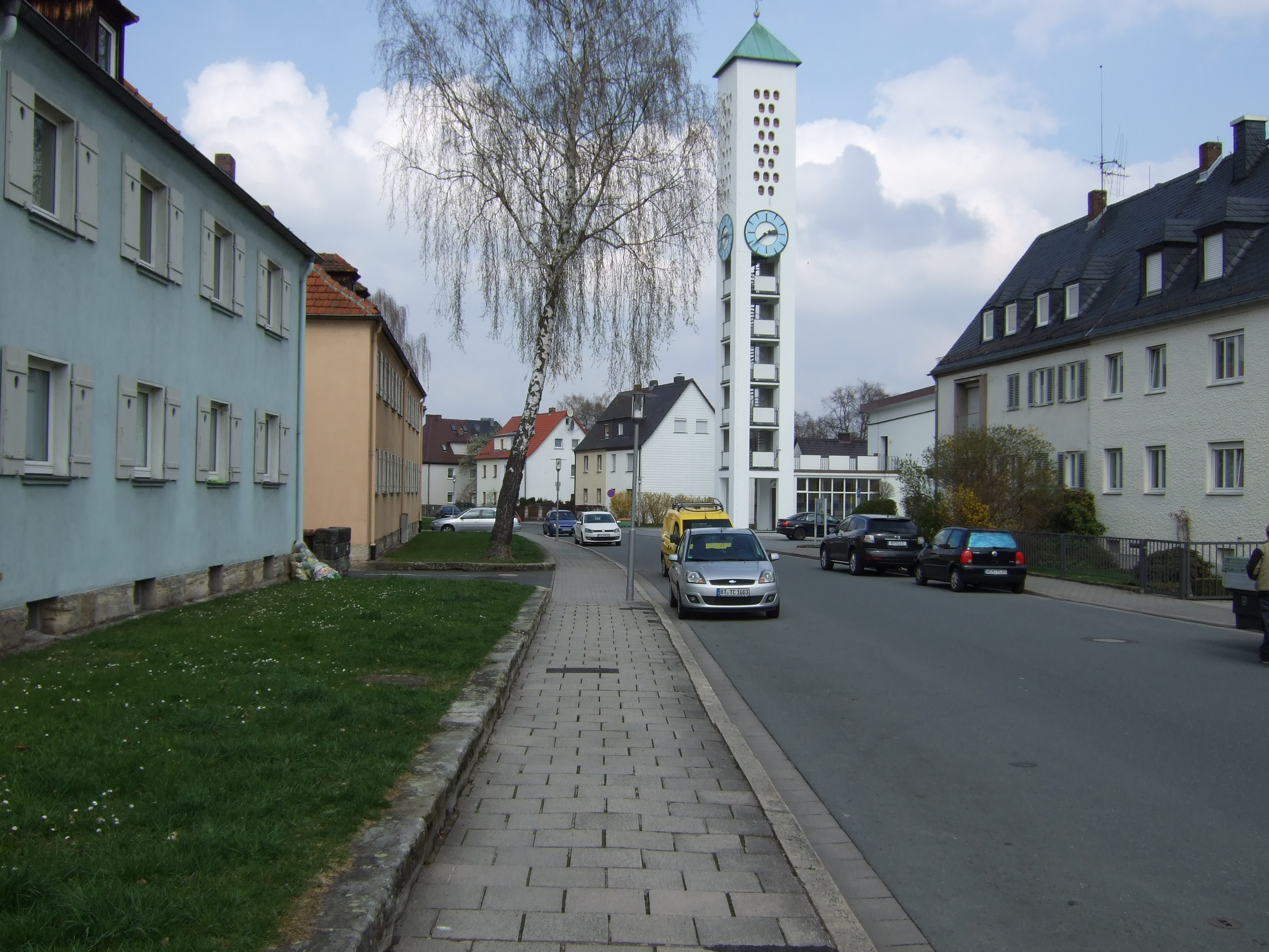 Kreuzkirche Bayreuth